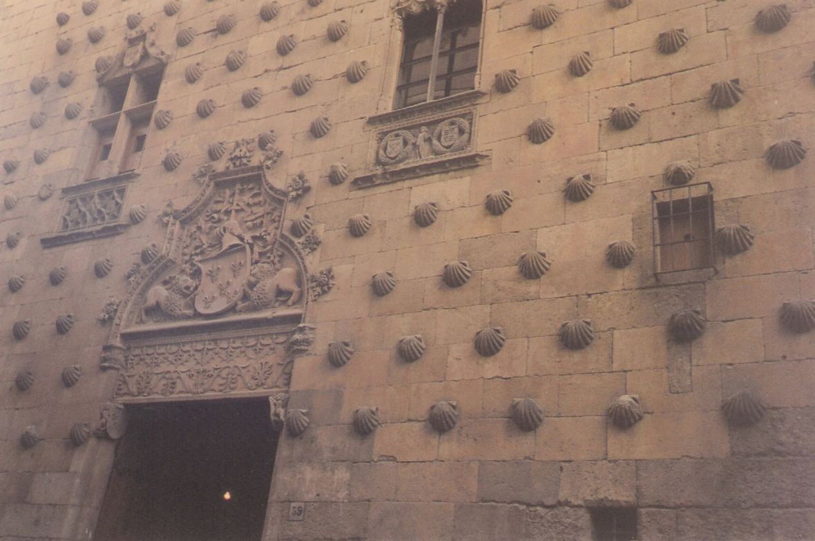 casa de las conchas, salamanca, spain